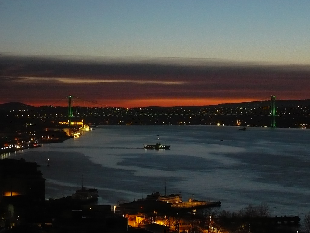 Başkurt Sokak 71, Cihangir, Istanbul